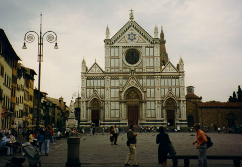 La facciata neogotica della Chiesa di Santa Croce a Firenze. Photo by Infrogmation, 1993.